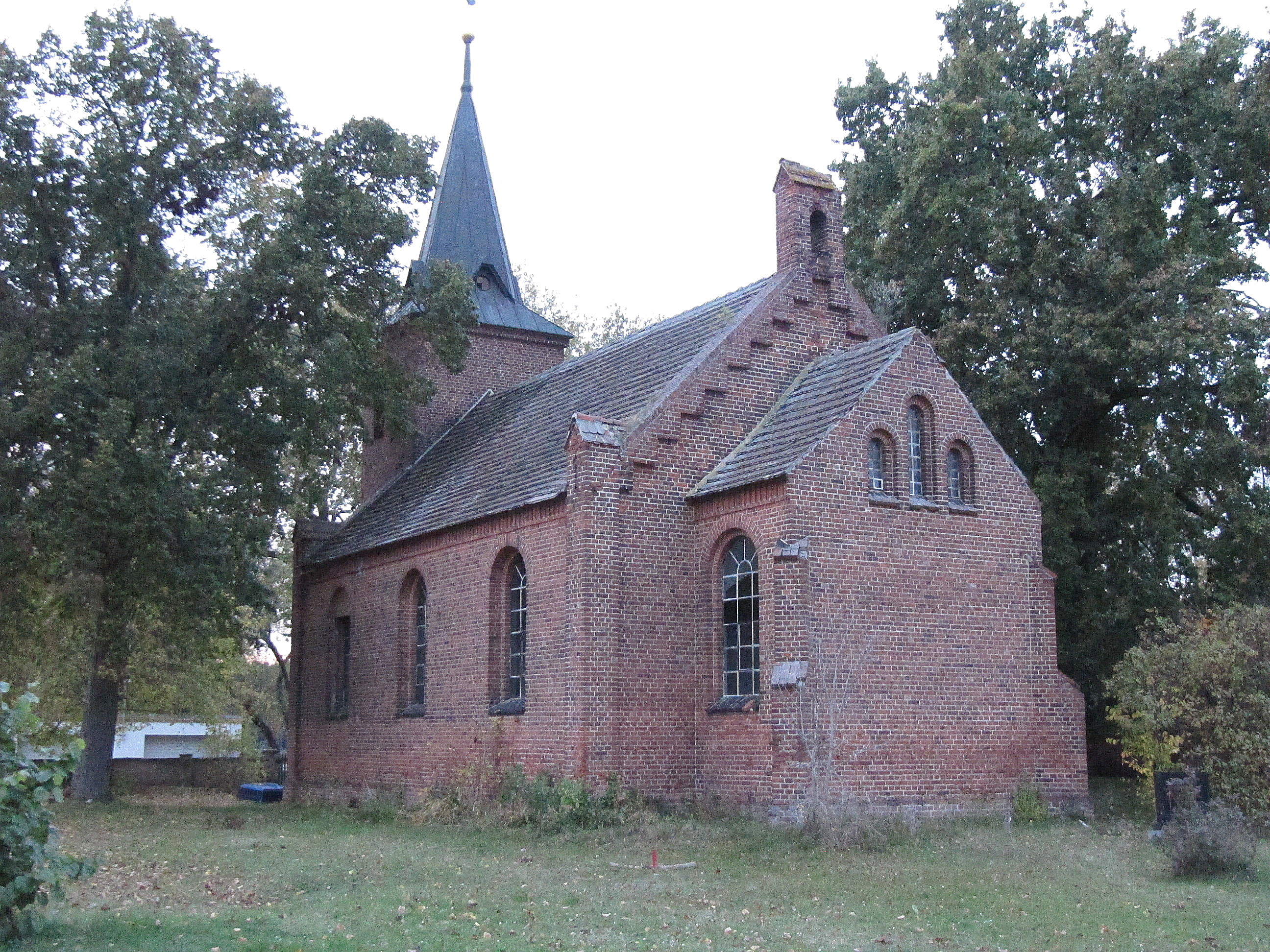 kirche in briest, havelsee